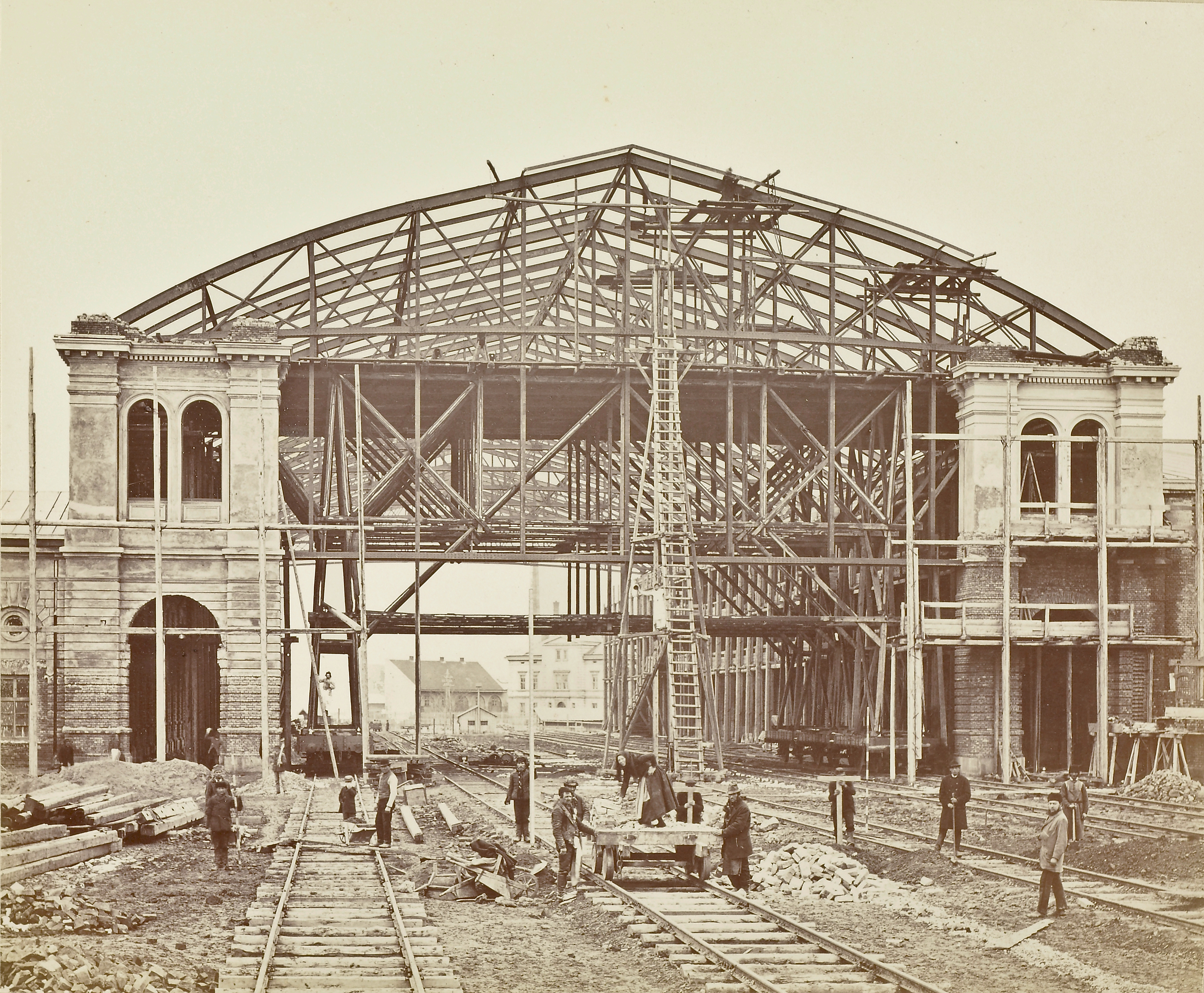 Personenhalle, Nordwestbahnhof Wien